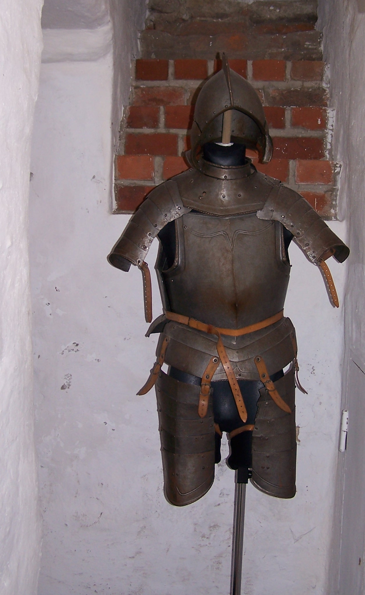 zamek książąt pomorskich, ob. muzeum Darłowo, ul. Zamkowa 1, Darłowo